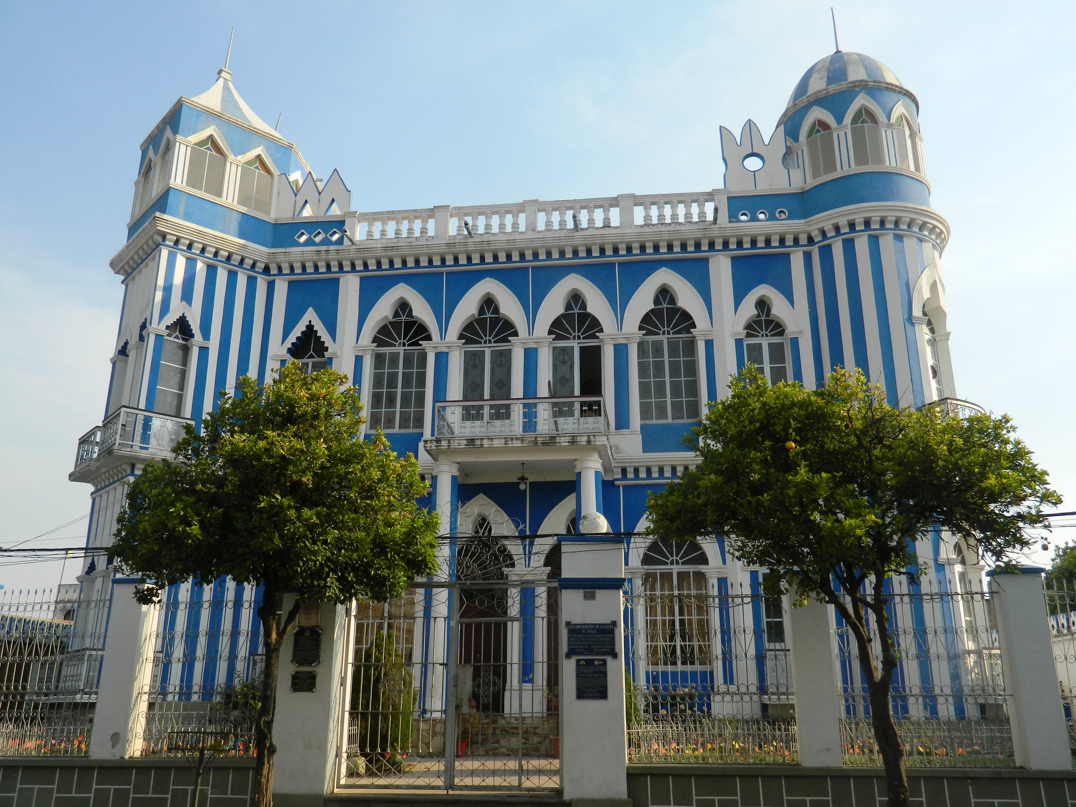 Castillo Azul Moisés Navajas This medium shows the protected monument with the number T/00-008 in Bolivia.